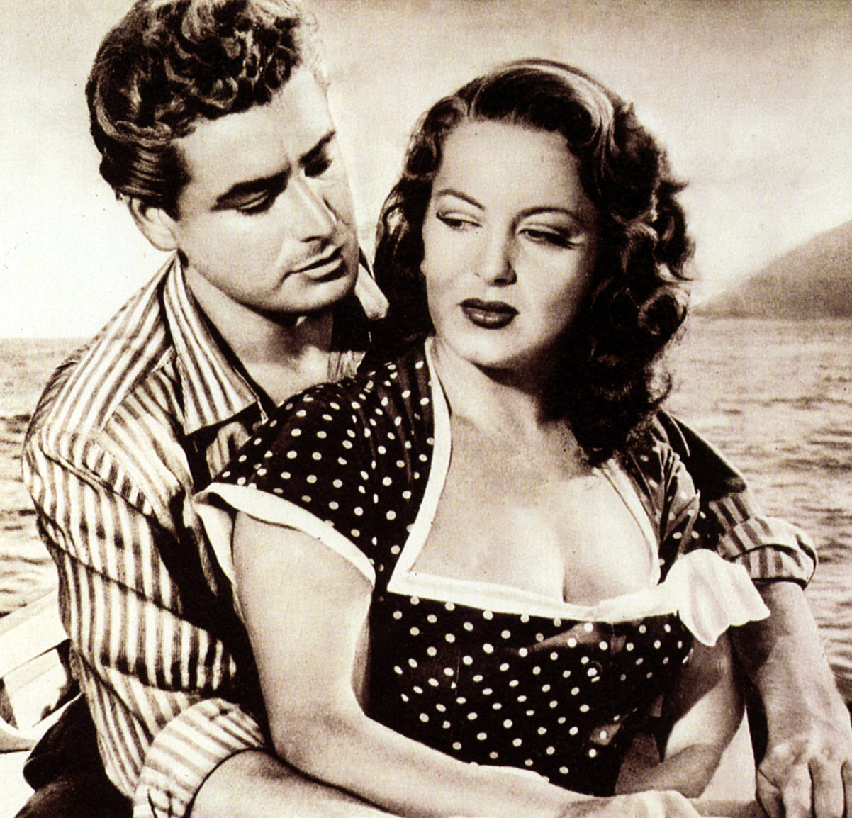 foto di scena di Menzogna